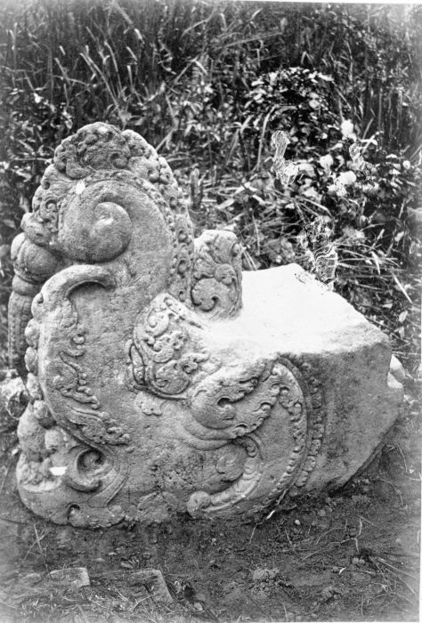 Foto. Deze foto is gemaakt tijdens de Sumatra Expeditie van 1877-1879. Landschappen en oudheden uit Djambi.. Beeld, waarschijnlijk deel van een Hindoeïstische tempel in de omgeving van Djambi, district Rawas, Sumatra